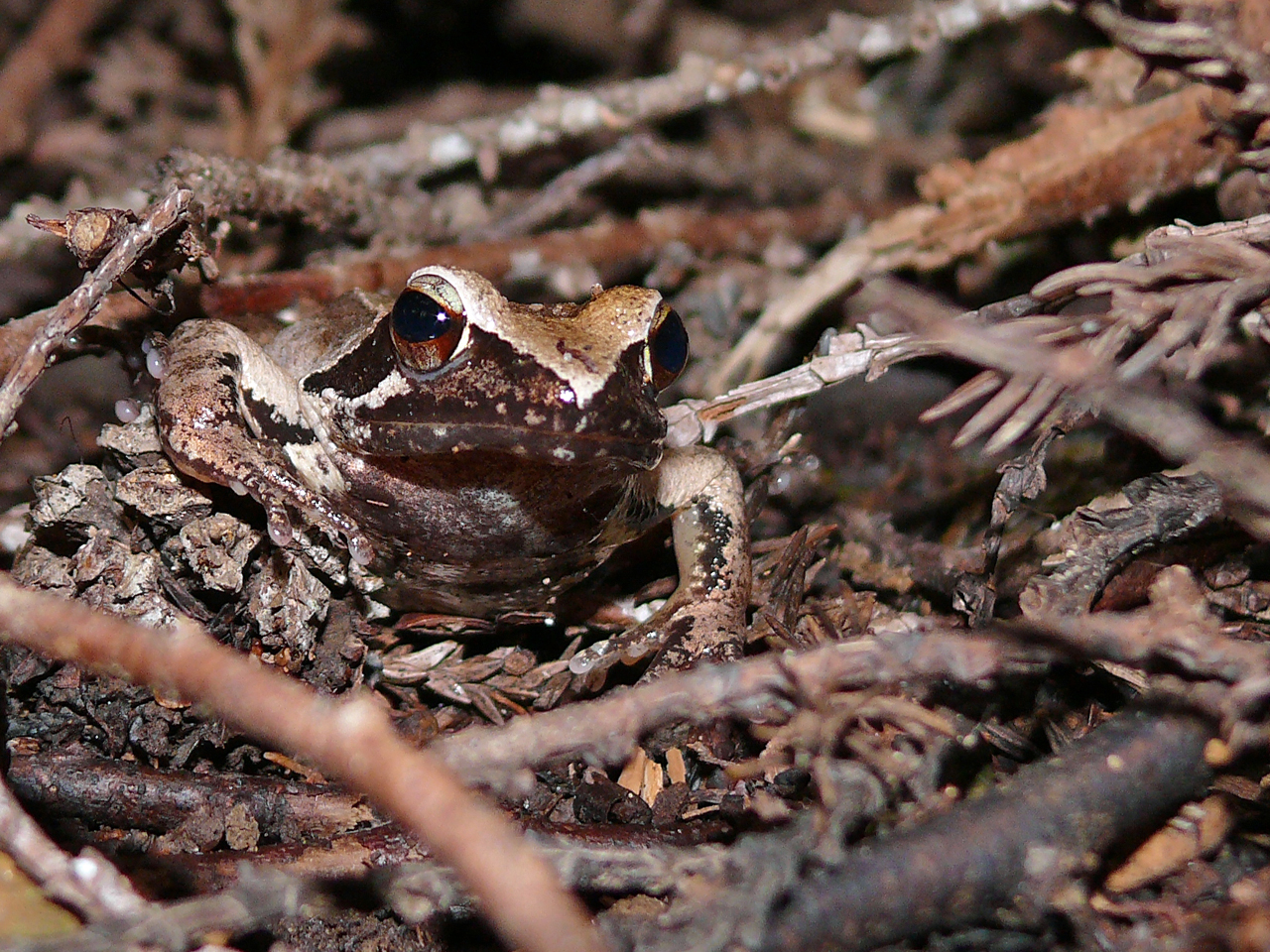 Rana tagoi tagoi at Izu, Japan. タゴガエル。伊豆半島にて。